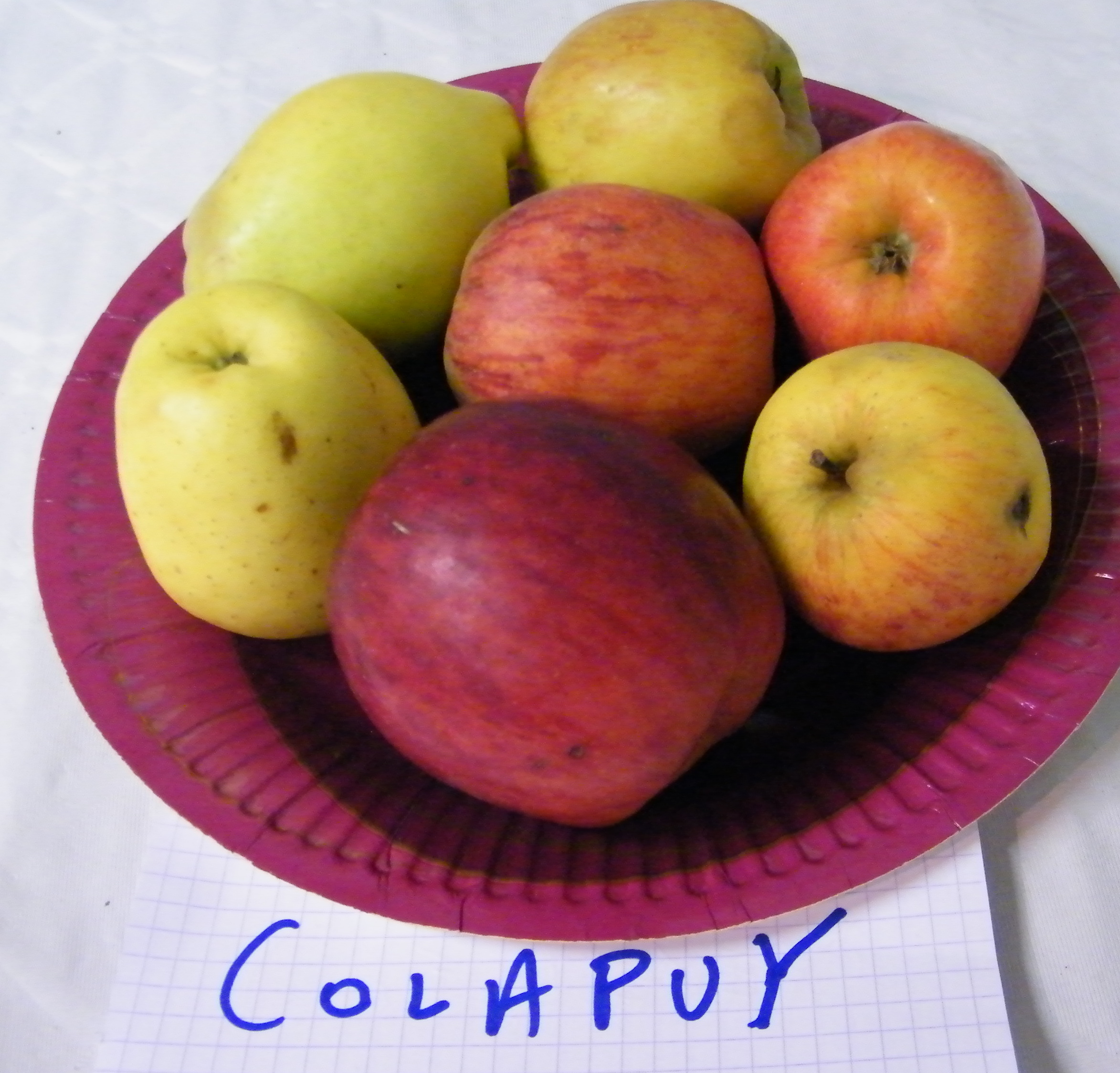 Colapuy, Mons-Boubert, Somme, Fr. Une variété aux formes et couleurs nombreuses.